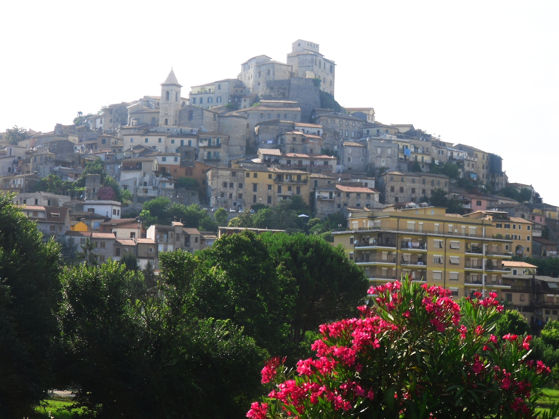 Autore: Roberto Di Molfetta Panoramica della città di Ceccano, provincia di Frosinone